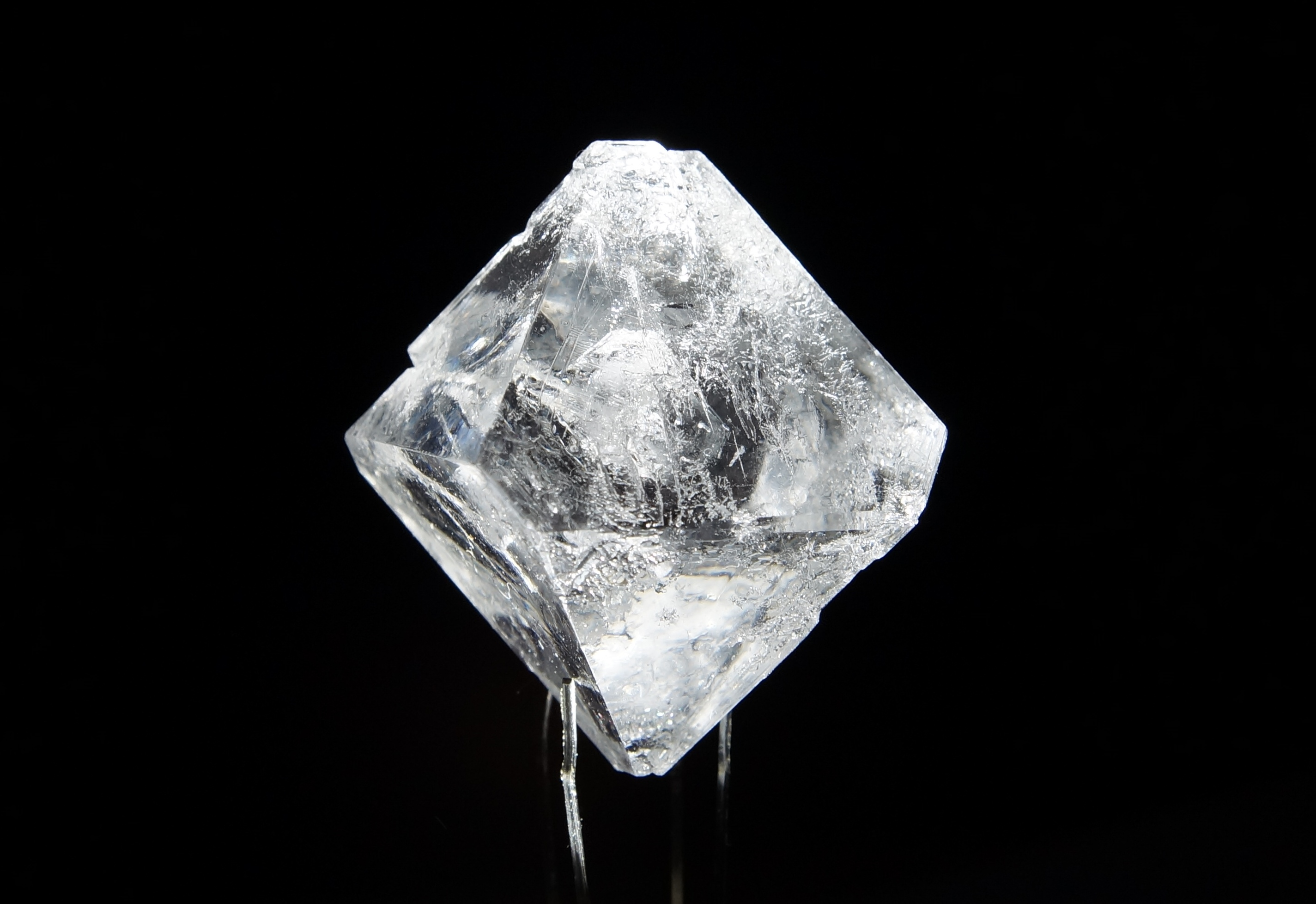 Alumiiniumkaaliumsulfaati monokristall. Kasvatamise aeg umbes kolm kuud. Pildistatud pimedas ruumis spetsiaalses valgustuses.